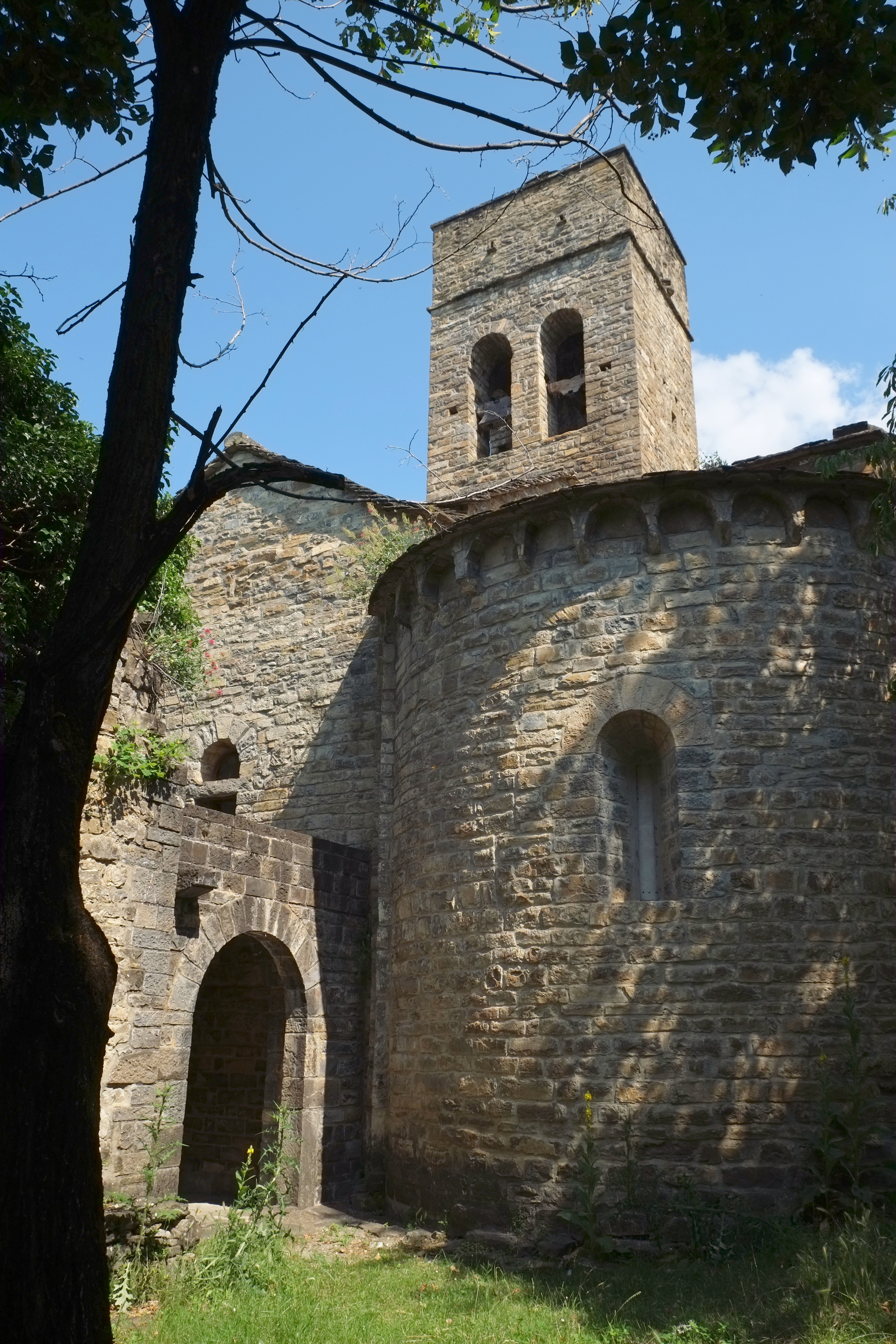 Kirche San Juan in Toledo de Lanata in Aragonien (Spanien)